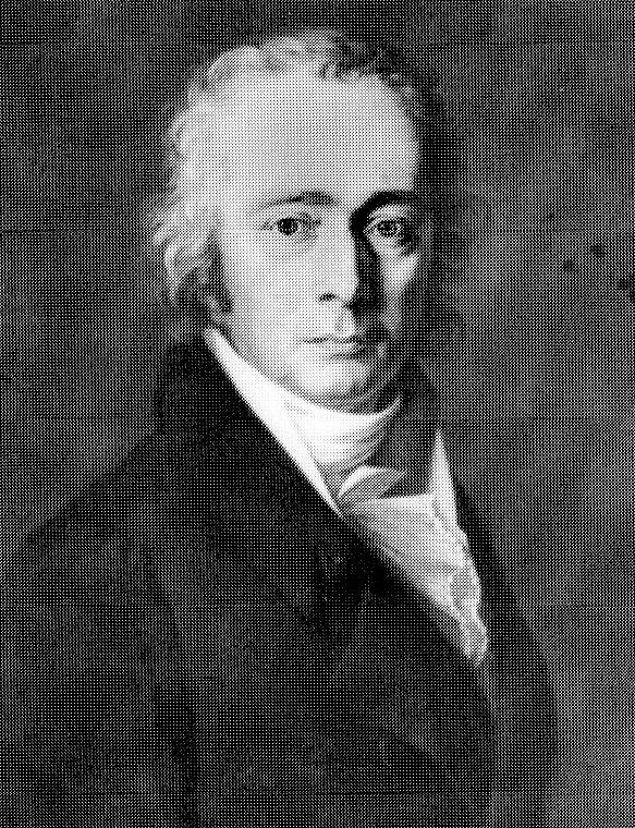 Gottlob Wilhelm Morff, Porträt Christian Jakob Zahn, Ölgemälde, 1818.